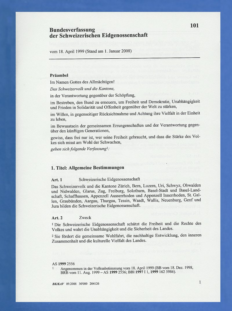 Bundesverfassung Schweiz, auf blauen Untergrund